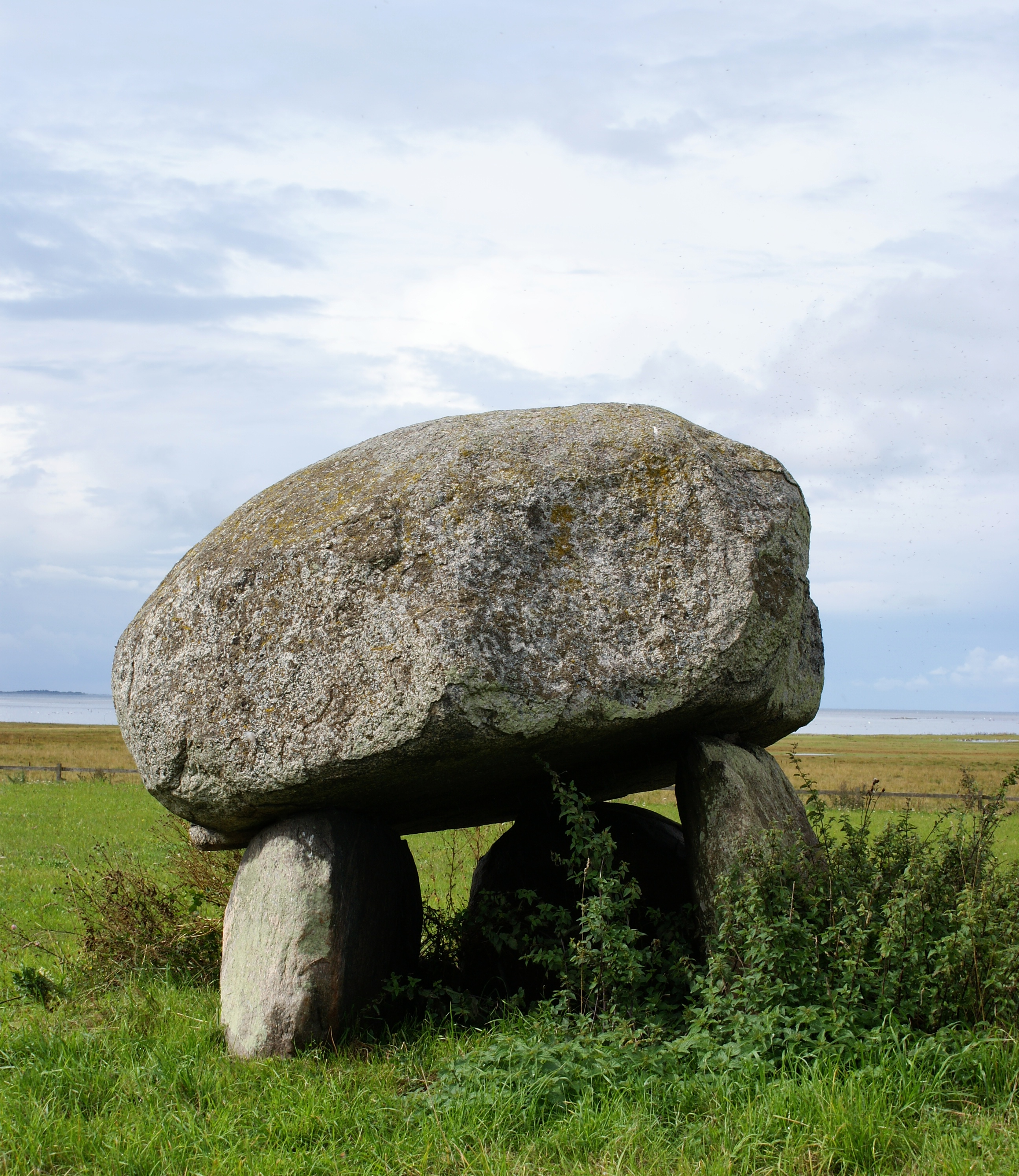 Eskilstorpsdösen